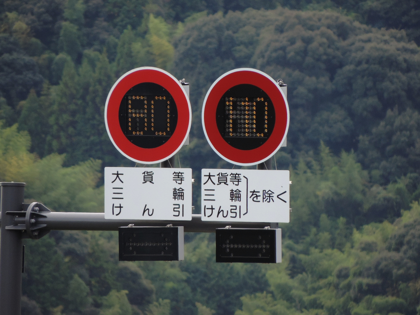 新東名高速道路の可変式速度規制標識（2017年11月撮影）